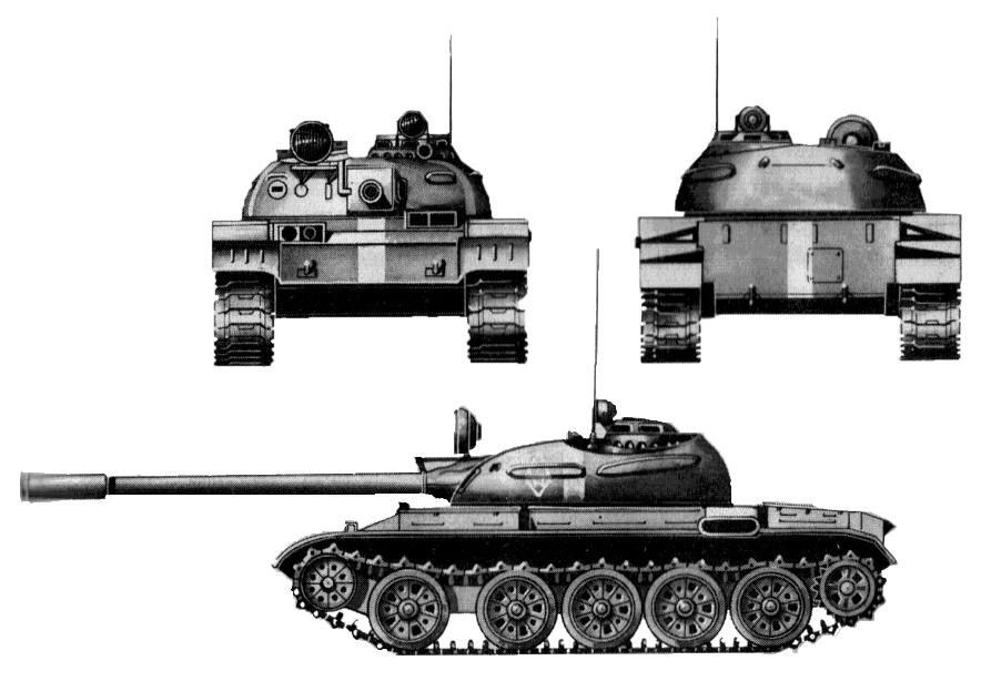 Bleistiftzeichnung nach einer Fotografie,erstellt 1978